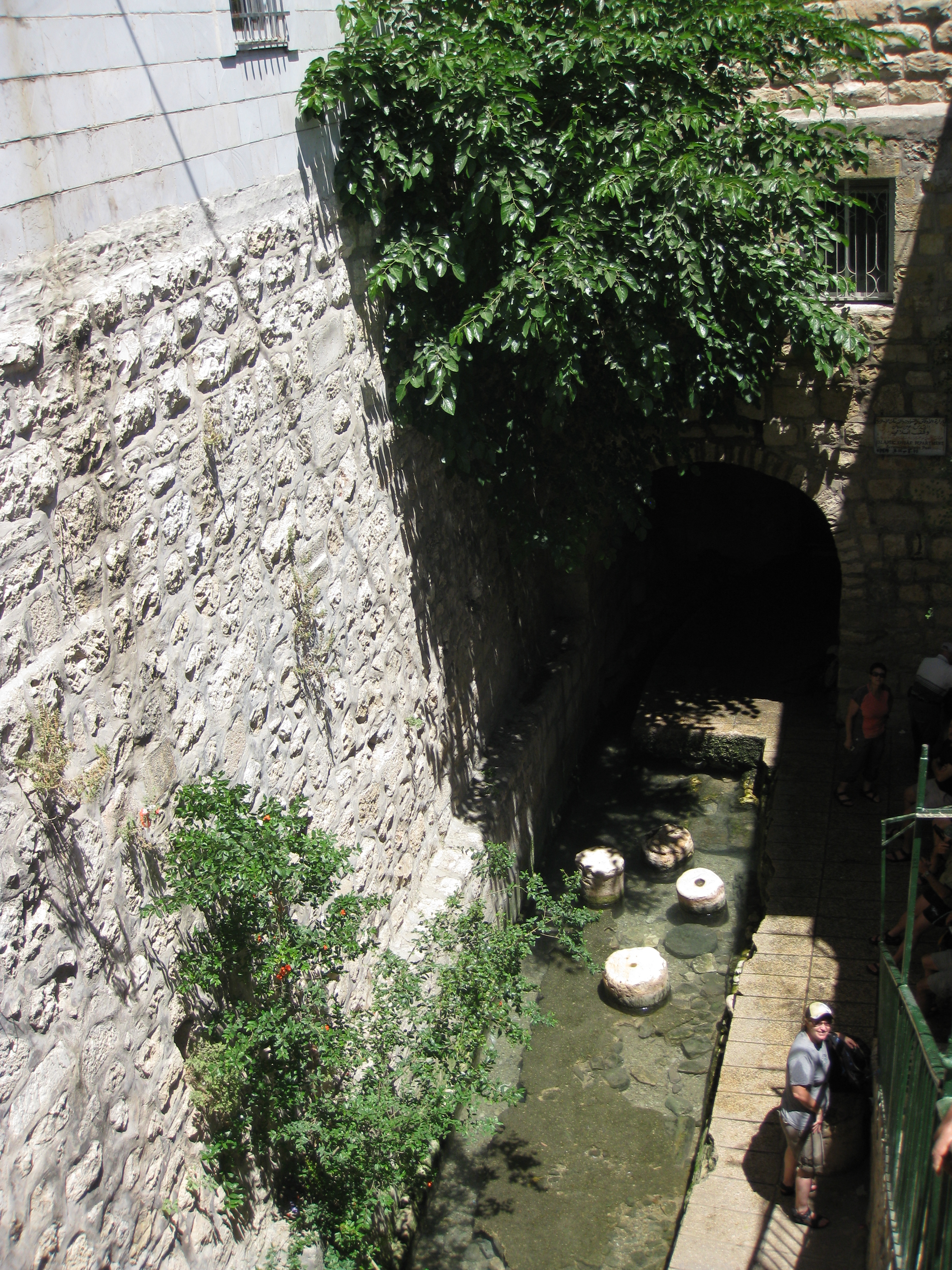 Pool of Siloam בריכת השילוח Byzantine pool הבריכה מהתקופה הביזנטית